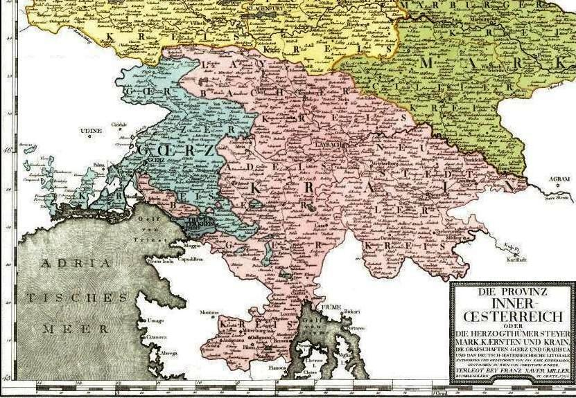 La Carniola nel 1794 - file derivato da File:AvI_Provinz_Innerösterreich caricato in Commons da Akela3 il 19 mar 2011 (v.voce Austria Interiore)